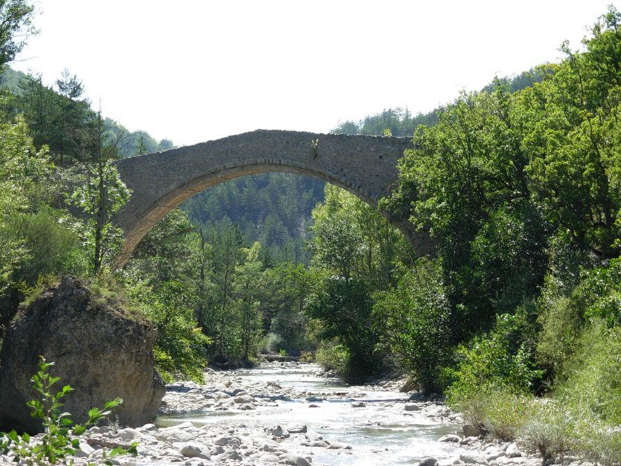 Pont de la reine Jeanne sur le Vançon à Entrepierres - Alpes-de-Haute-Provence